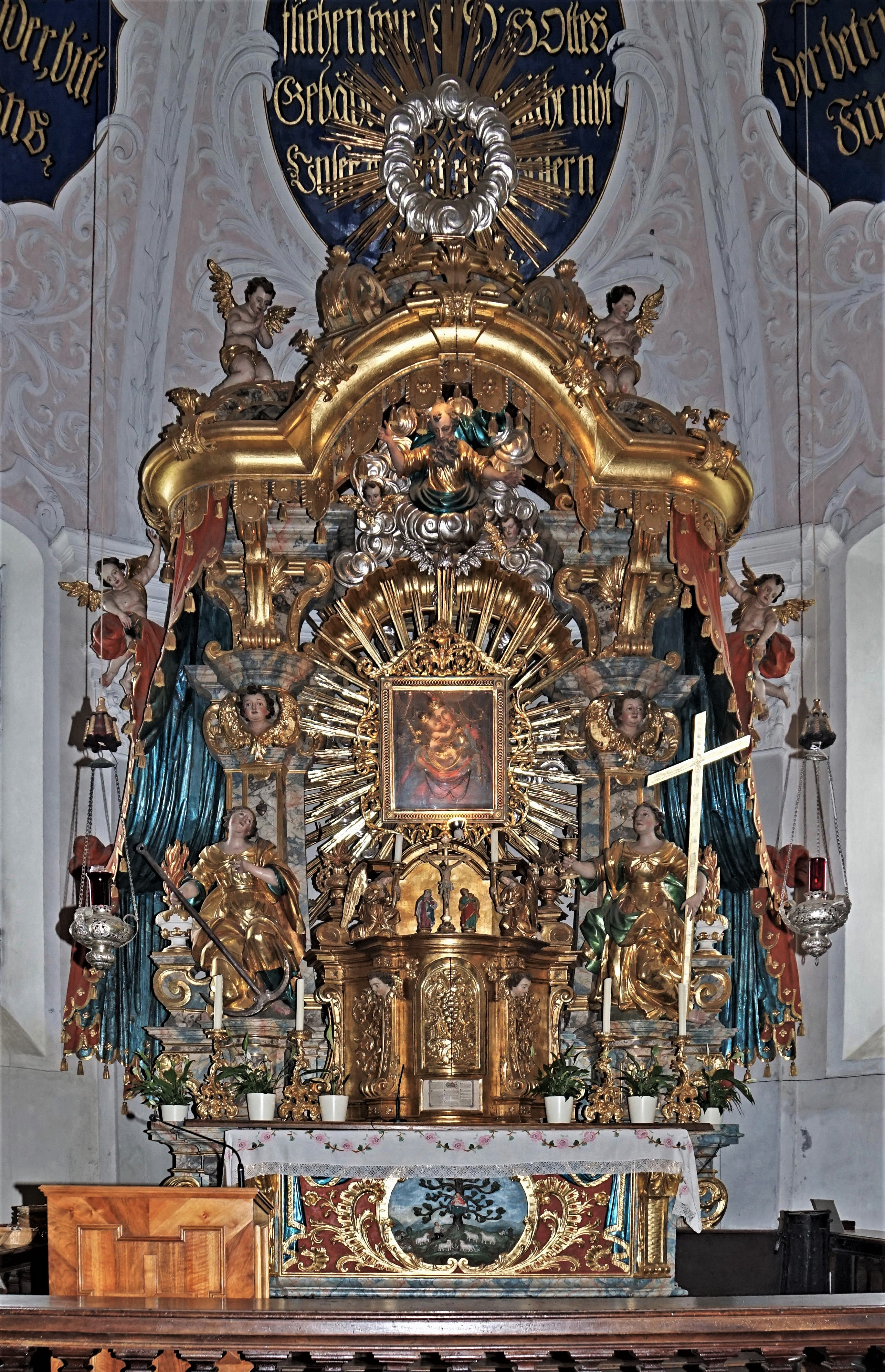 Wallfahrtskirche Maria Hilf (Guttaring), barocker Hochaltar